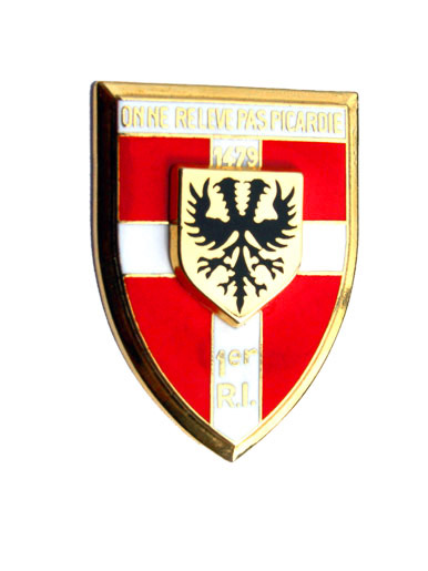 Insigne régimentaire du 1er régiment d'infanterie.